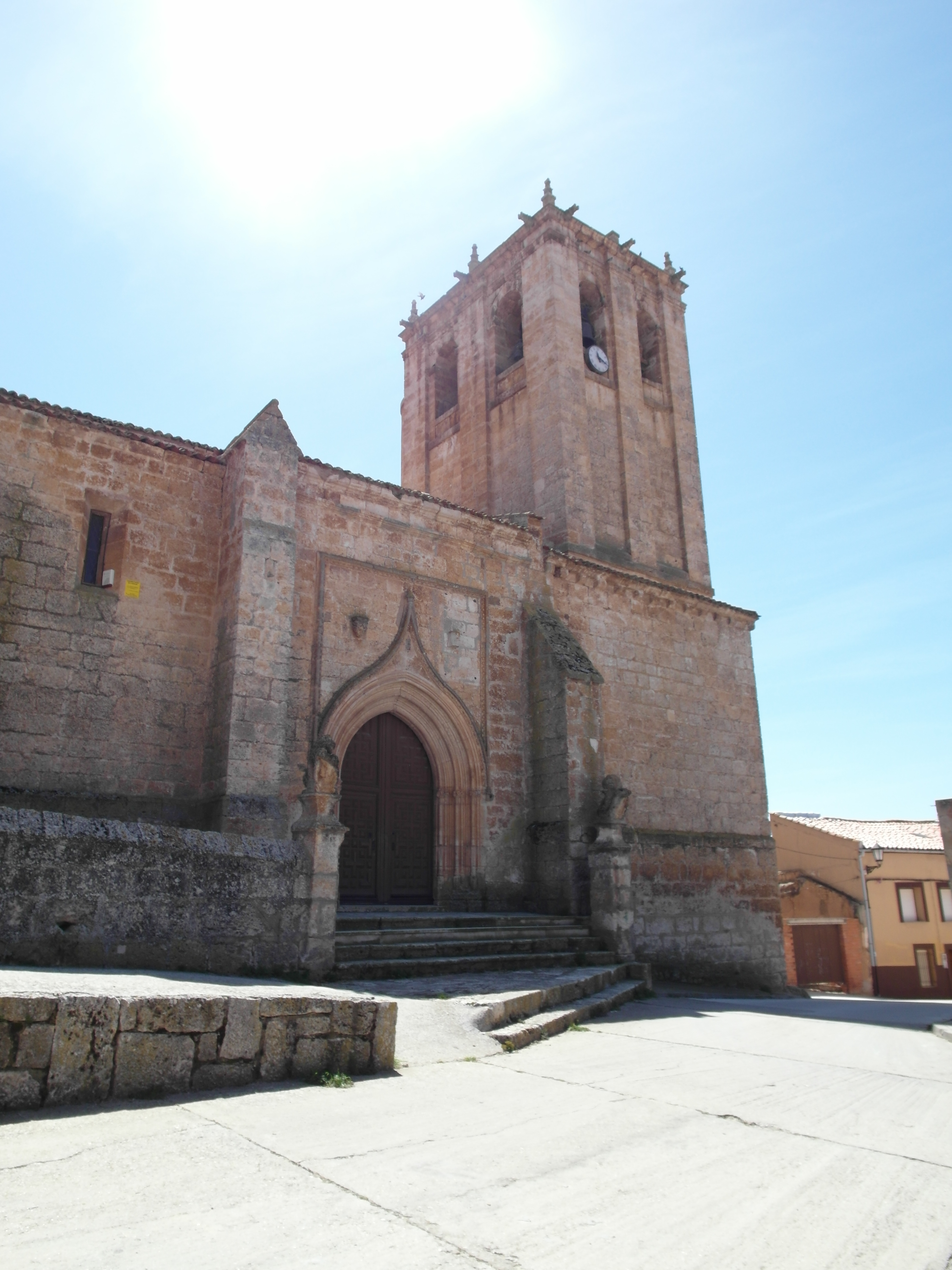 Iglesia de Santa María, Gumiel de Mercado, Burgos.